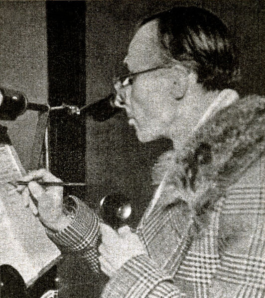 photo from the Italian magazine Almanacco Cinema italiano (1952)